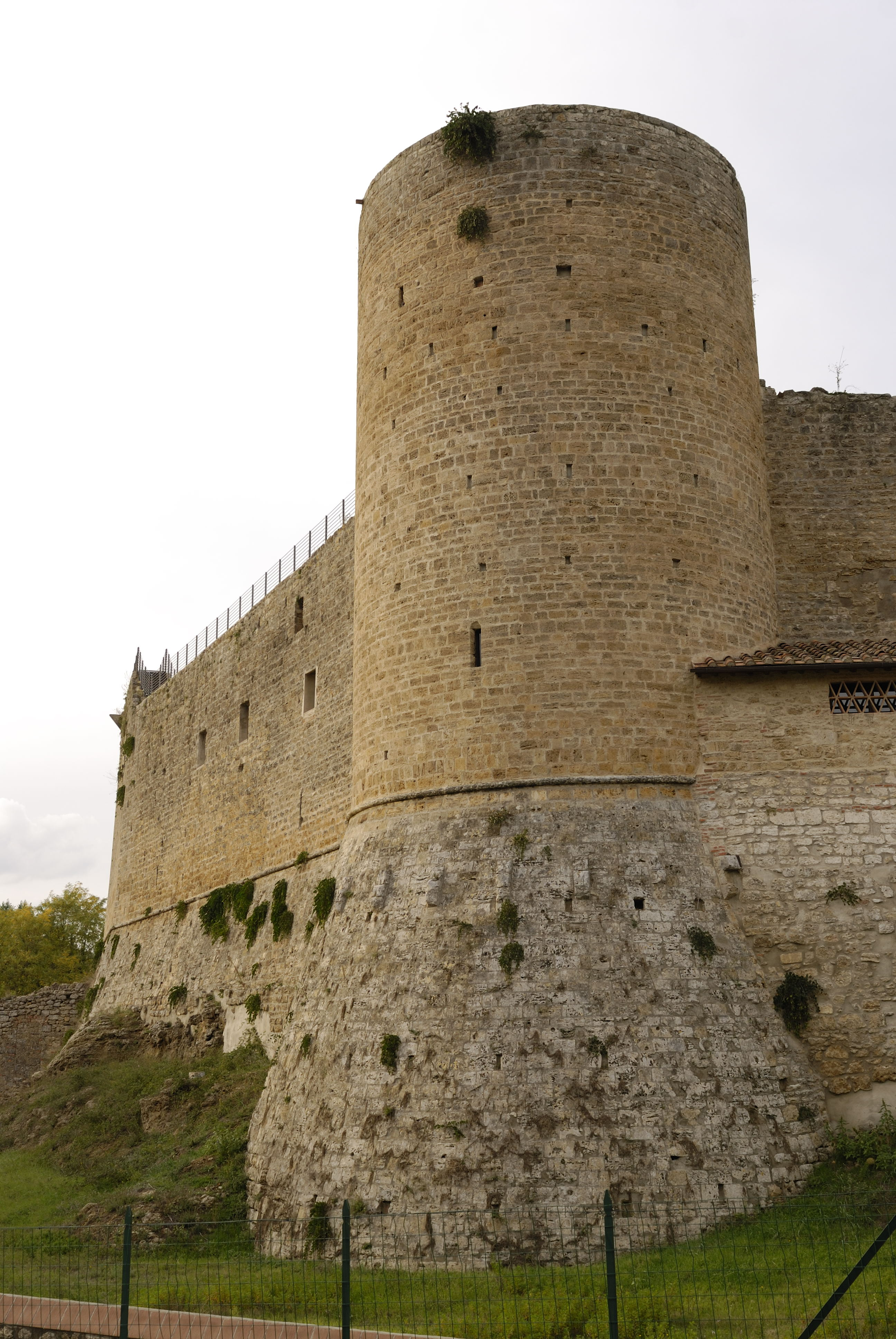 Torre del Castello di Staggia Senese - Poggibonsi - Siena